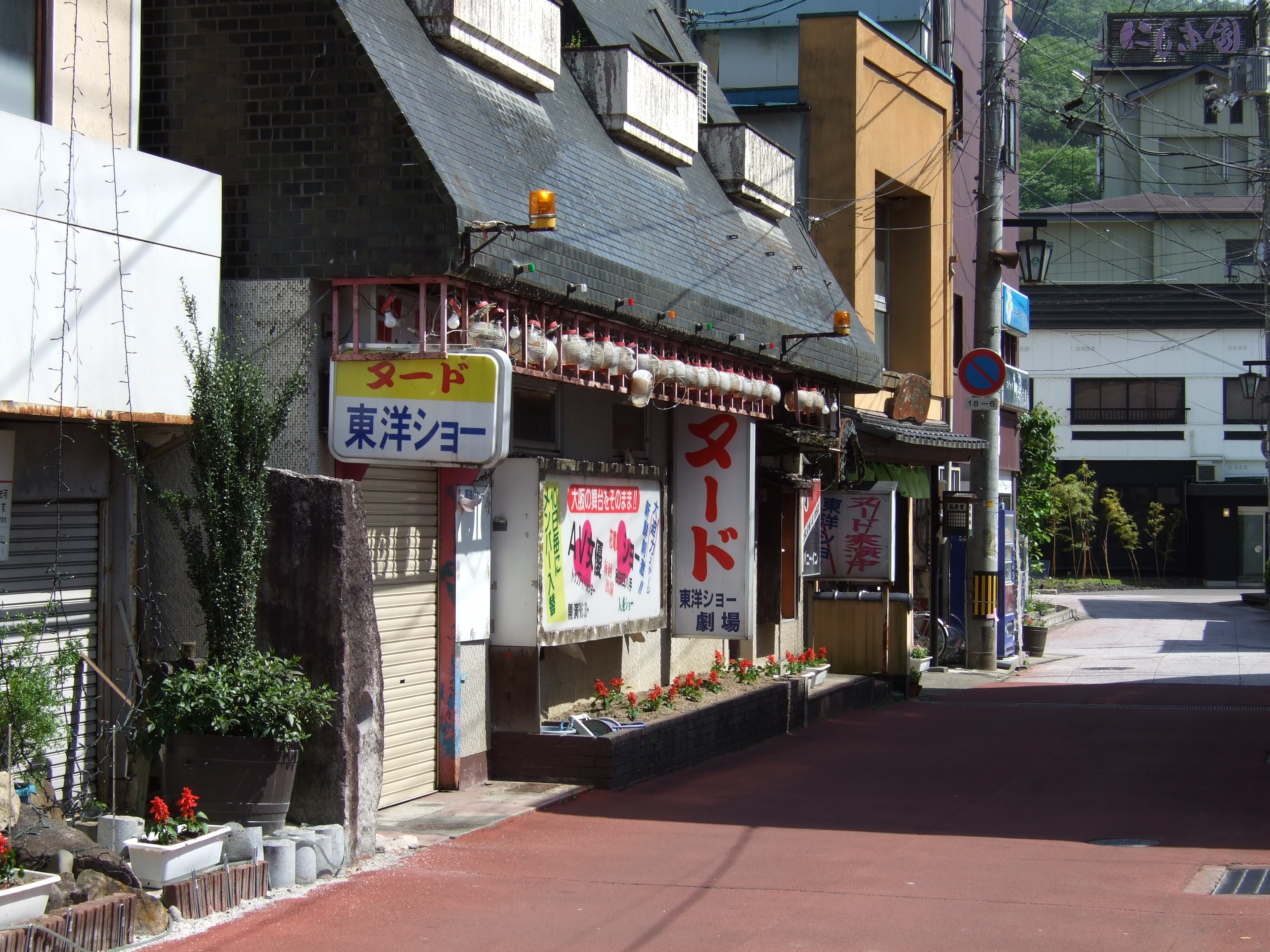 湯郷温泉にある潰れた風俗店